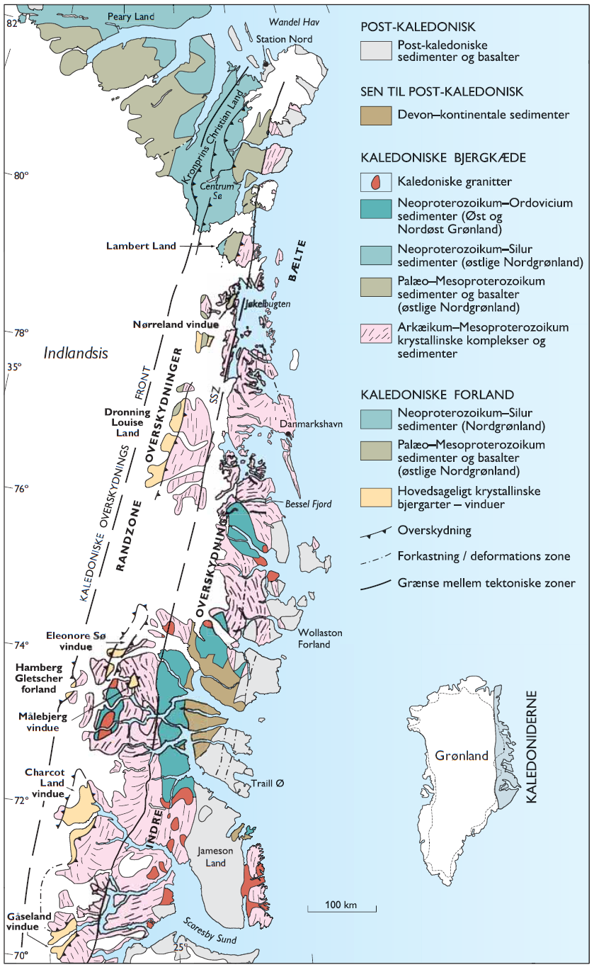 Oversigtskort over det kaledoniske foldebælte i Nordøstgrønland